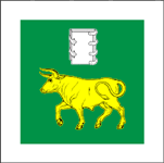 Flag of Ciorescu, Chișinău